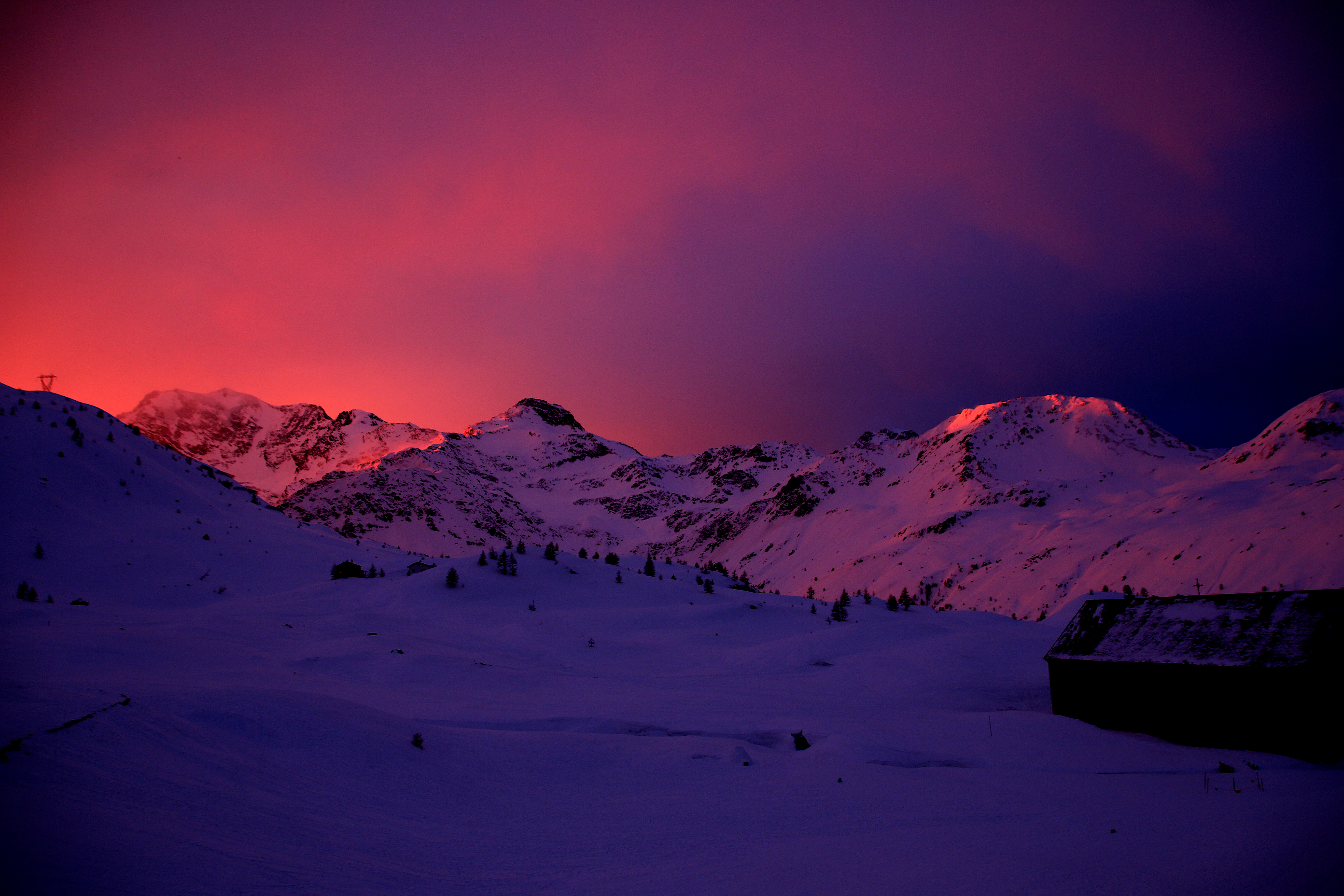 Sonnenaufgang auf dem Simplonpass (2018)